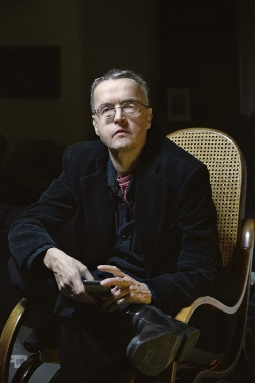 Garaczi László magyar író, költő, műfordító.